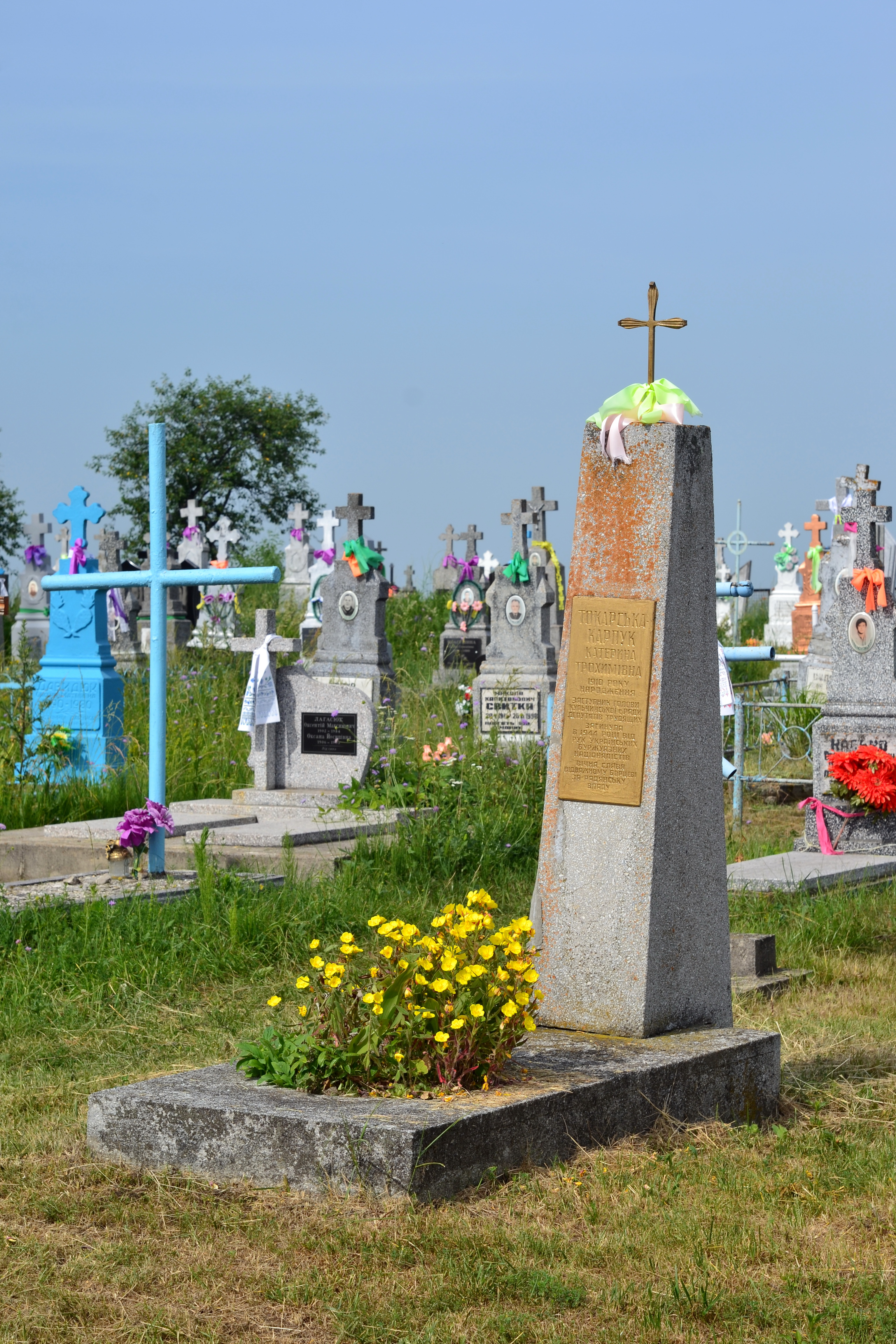 Могила Токарської-Карпук К. Т. (1969 рік) - Кульчин (на кладовищі) Турійський район Волинська область Україна